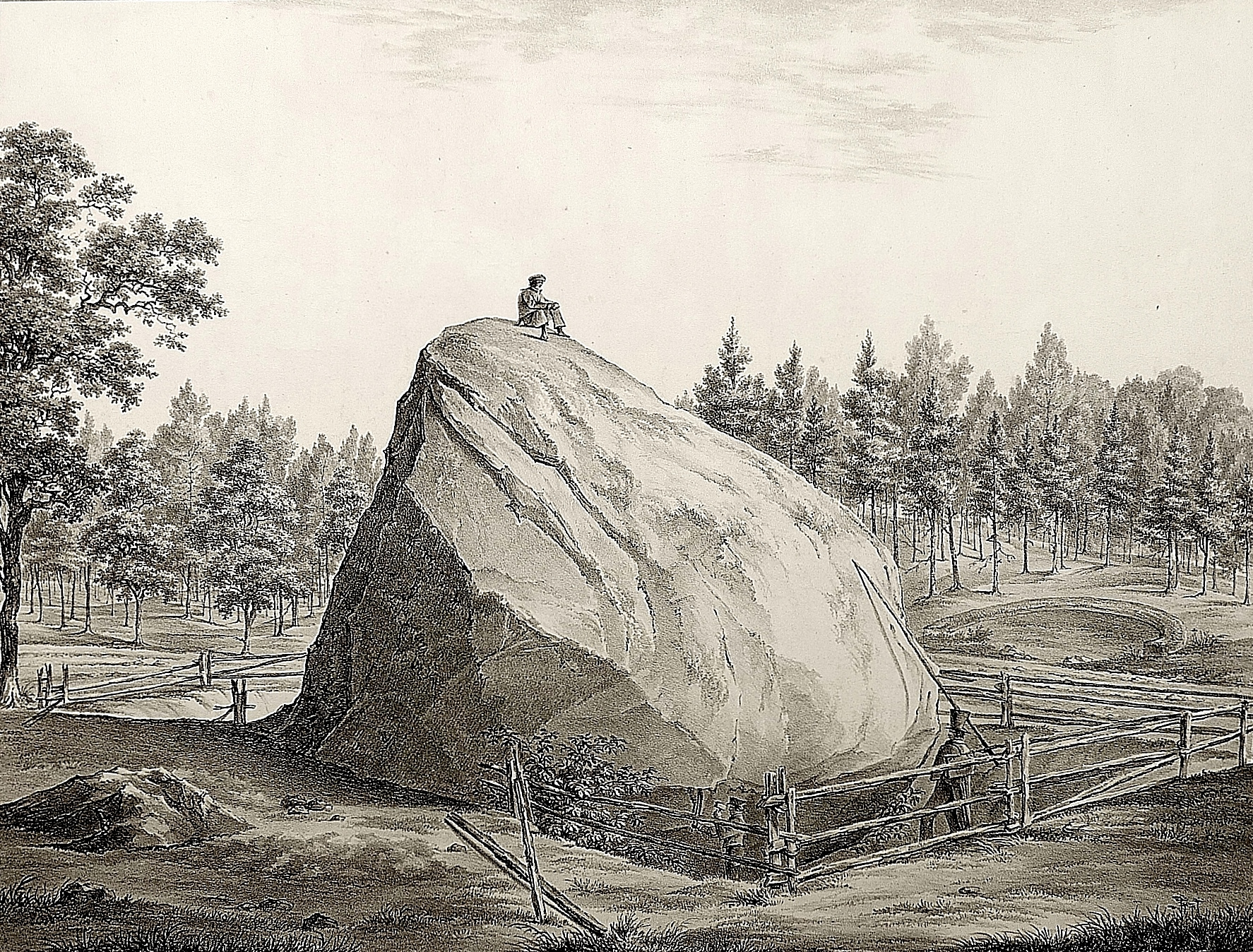 Abbildung des großen Markgrafen Steins auf den Rauenschen Bergen bei Fürstenwalde. Lithografie, Darstellung: 32,7 × 43,5 cm, Blatt: 42,4 × 52,5 cm